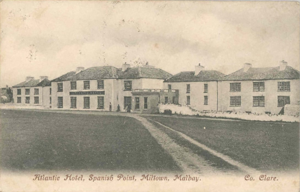 Postcard Atlantic Hotel Spanish Point, co. Clare